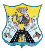 Escudo del municipio sonorense.